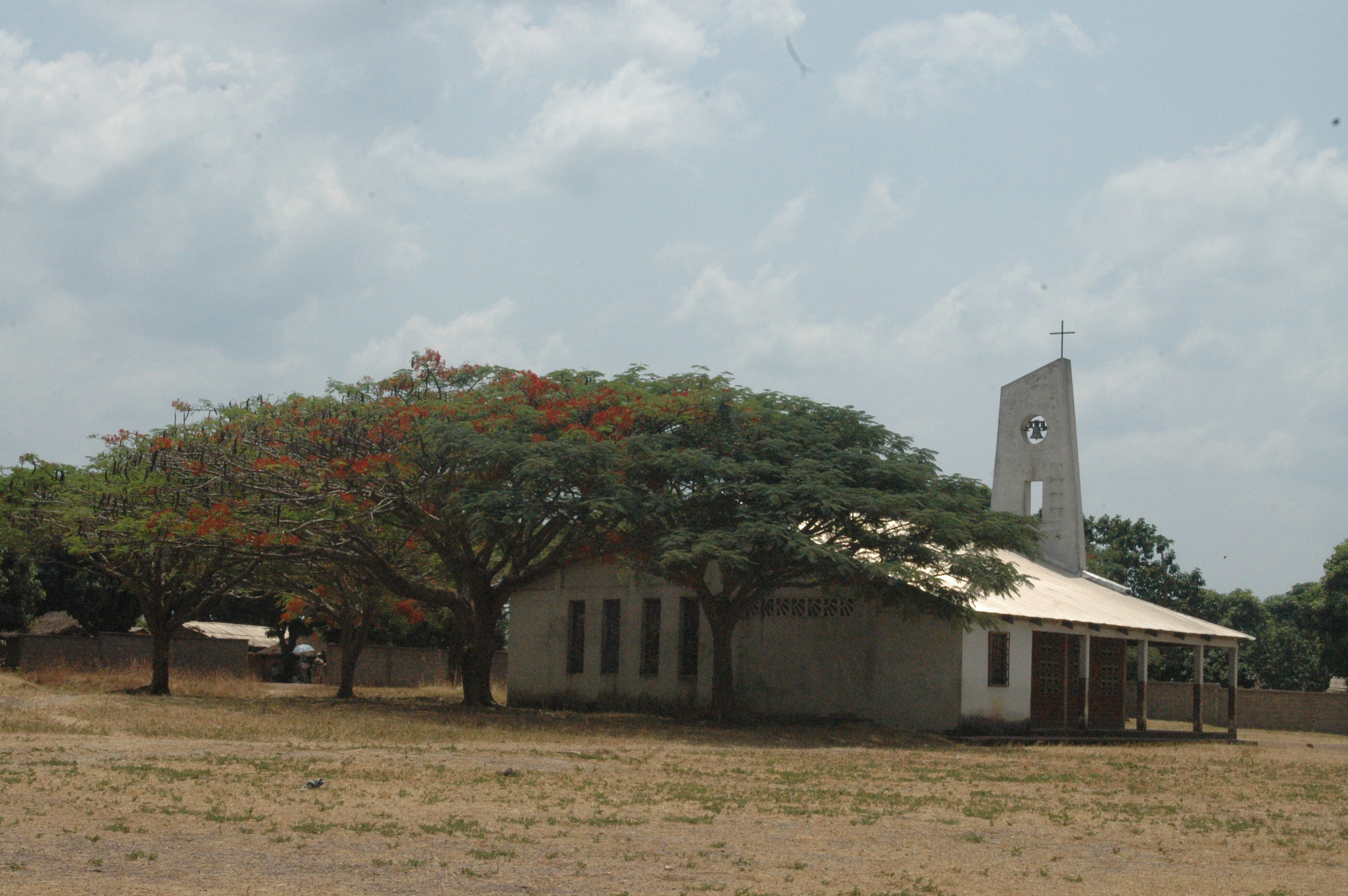 Eglise du village de Niem (diocèse de Bouar), dans le nord-ouest de la République Centrafricaine.